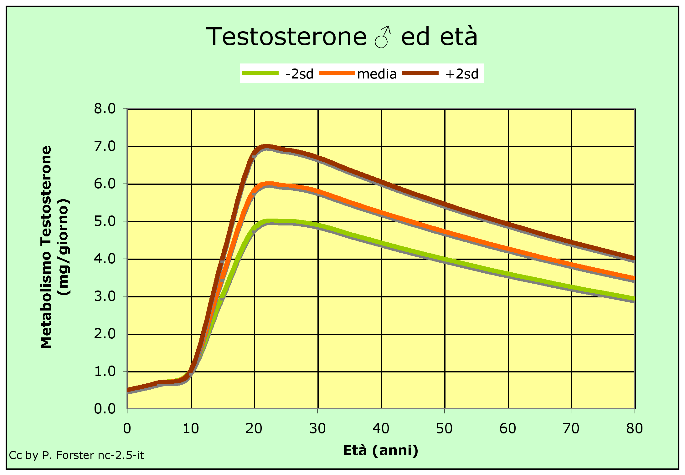 Testosterone maschile: sintesi giornaliera in funzione dell'età